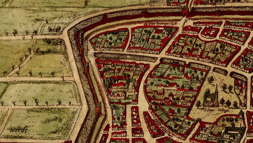 Uitsnede uit kaart vd stad Utrecht. In het midden vd uitsnede het Begijnhof. Noot: oost ligt boven.